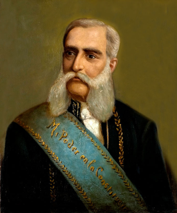 Luis Benjamín Cordero y Crespo (6 April 1833 – 30 January 1912)